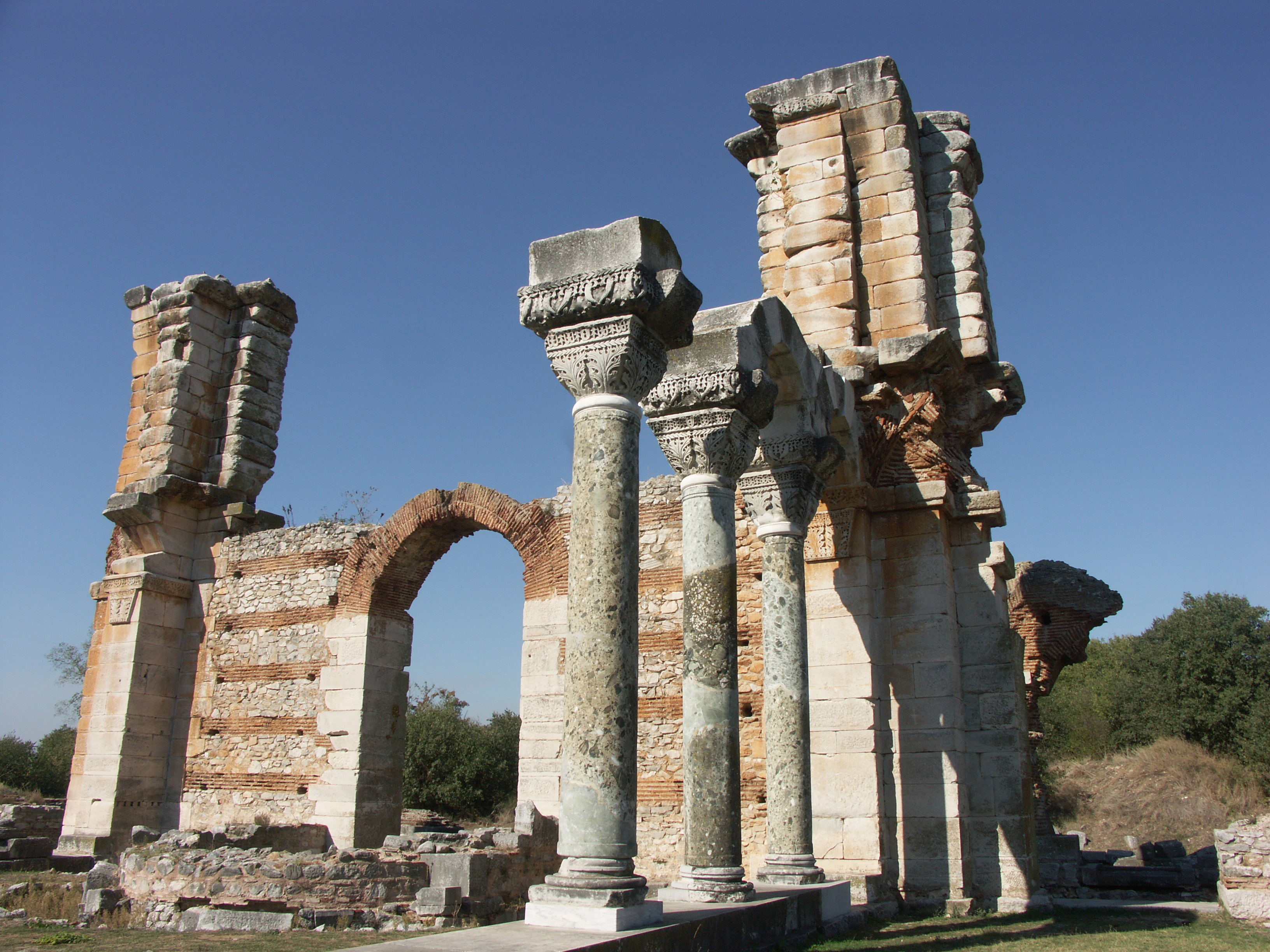 Basilique B ou Basilique des piliers